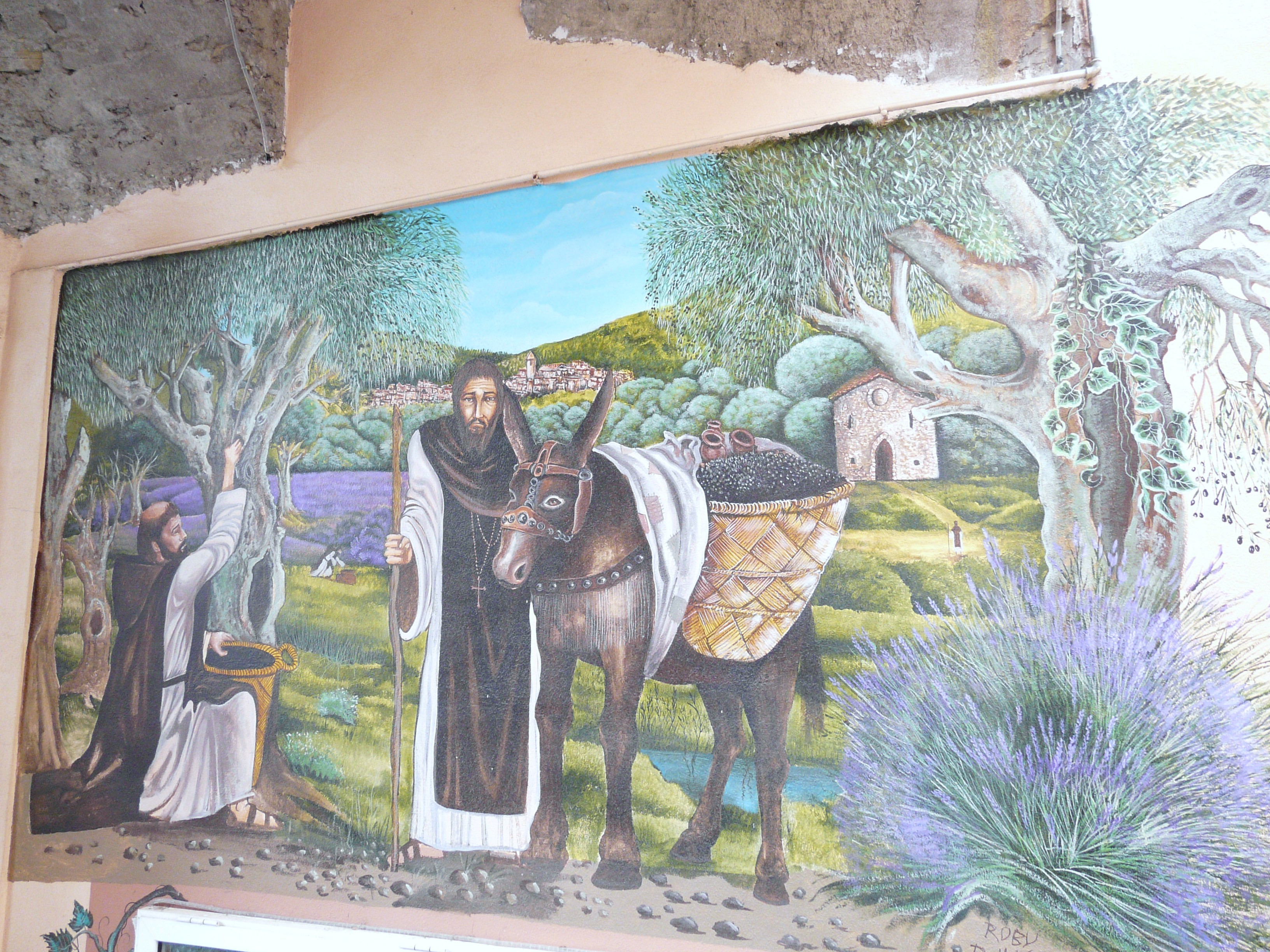 Affresco ad Olivetta San Michele, Liguria, Italia